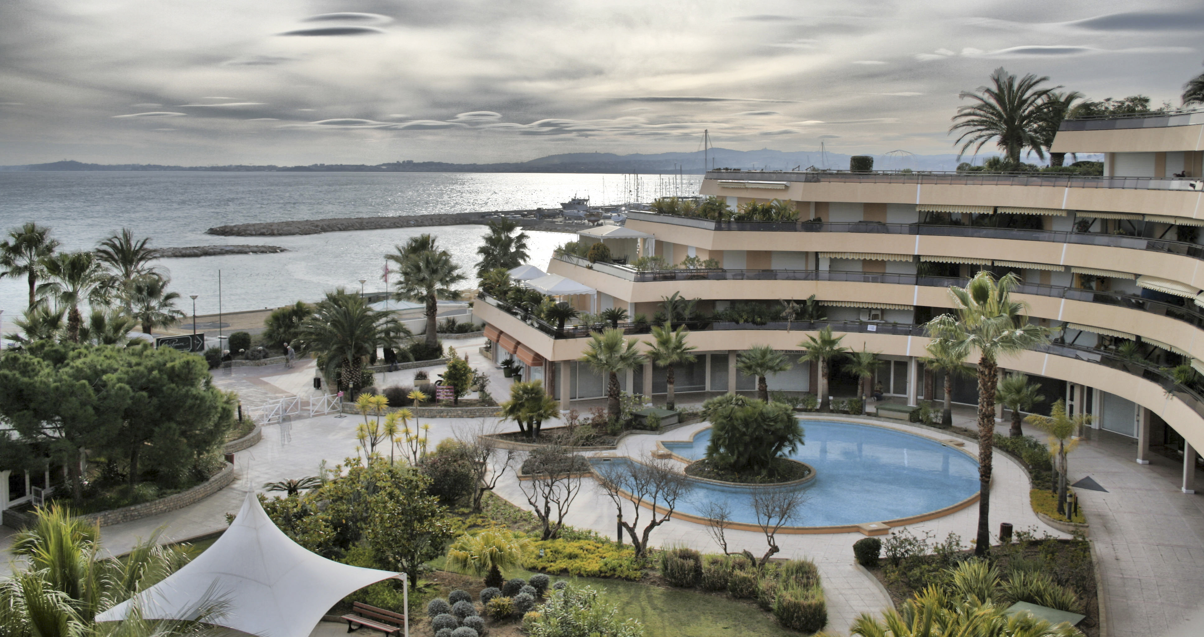 Holiday Inn Resort Nice-Port Saint-Laurent, in Saint-Laurent-du-Var, Alpes-Maritimes, France